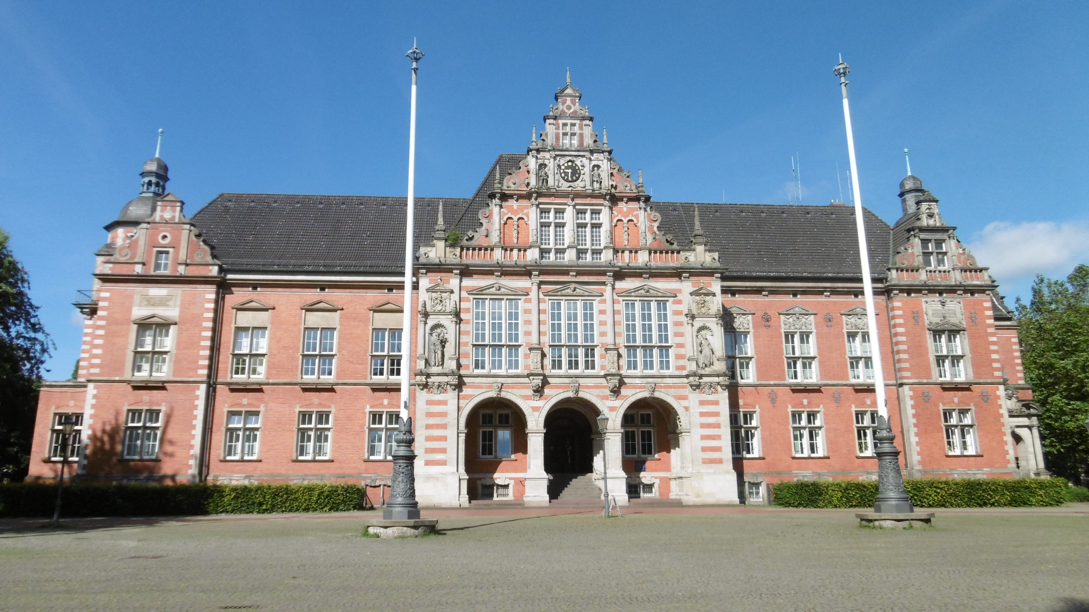 Dieses Foto zeigt das Harburger Rathaus bei Sonnenschein.